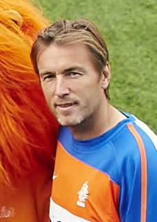 Richard Witschge tijdens de ING Ballenmeisjes Selectiedag in Zwolle op 6 september 2013.